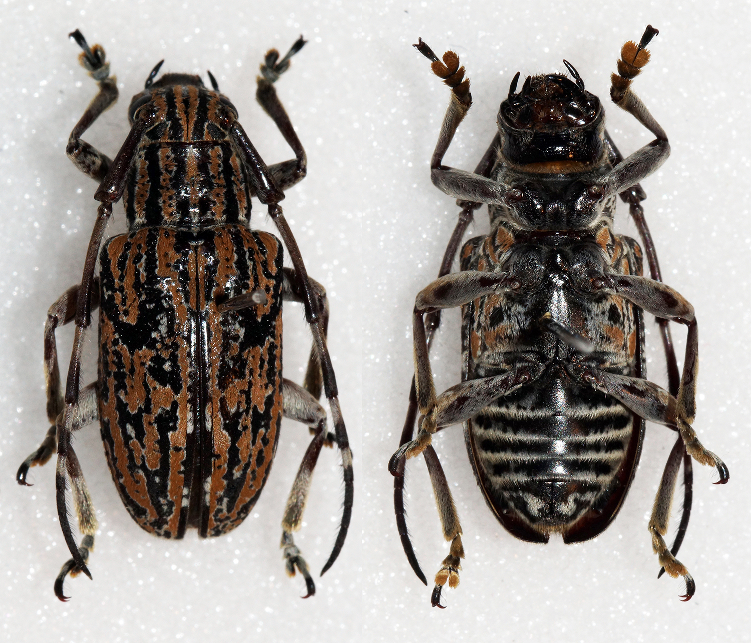 Pascoe,1865 Sex: Female Data: 13-03-14 - Kuamut - Sabah - Malaysia Size: 17mm